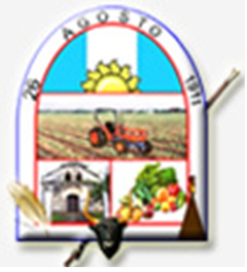 Escudo del municipio de Monjas, Jalapa